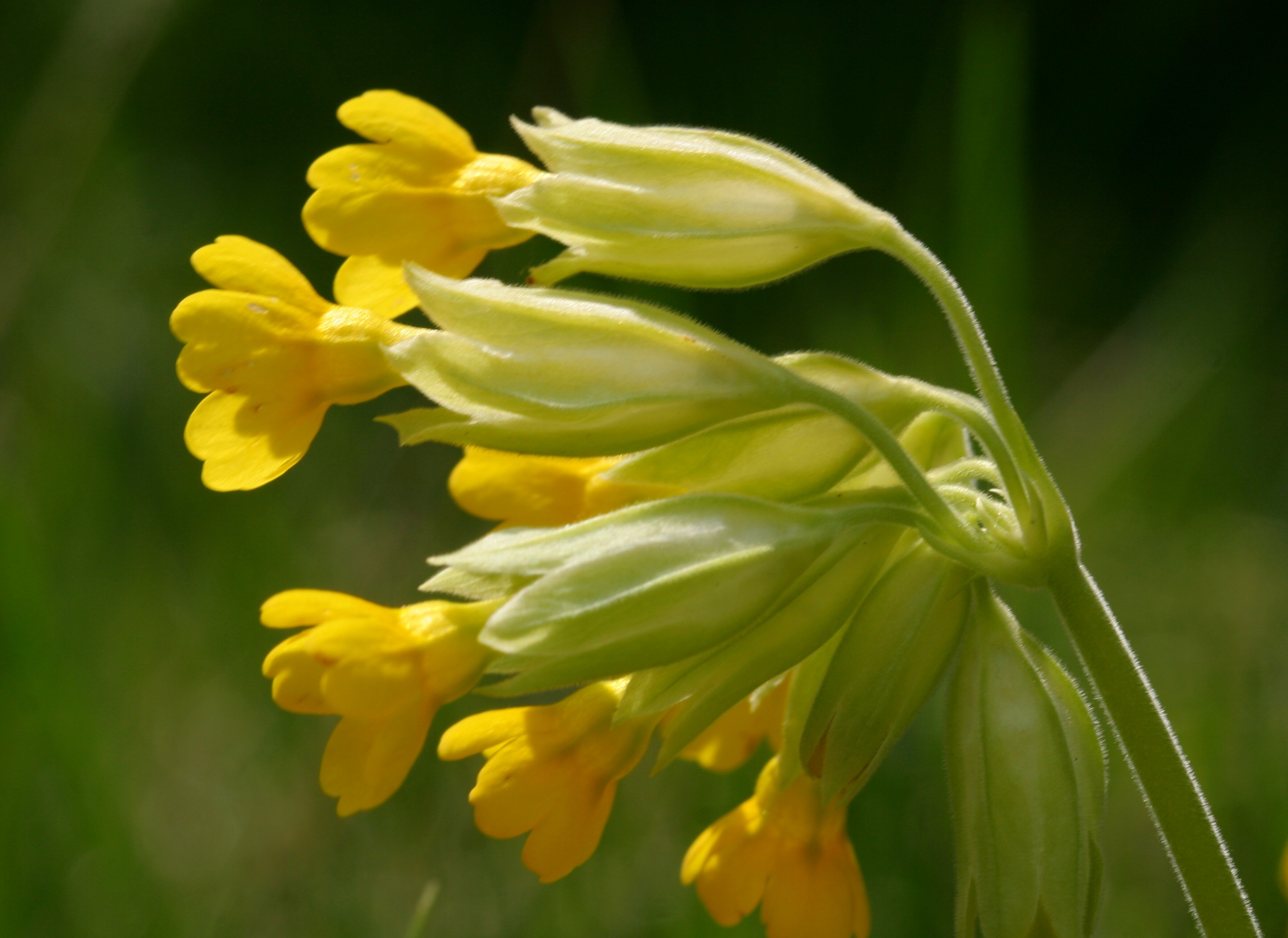 Primula_veris (Primula odorosa) Località : Pianezze, Trichiana (BL), 859 m s.l.m.